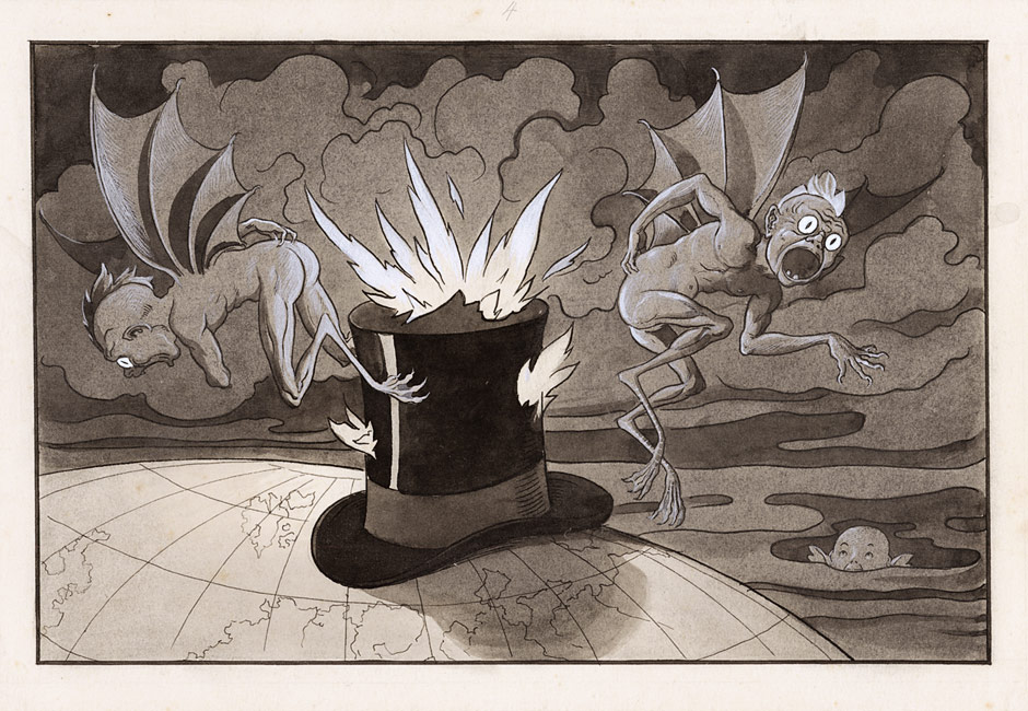 entstanden zur Illustration einer satirischen Kurzgeschichte von Jakob Wassermann für den Simplicissimus (Band 1, Heft 2, S. 4)